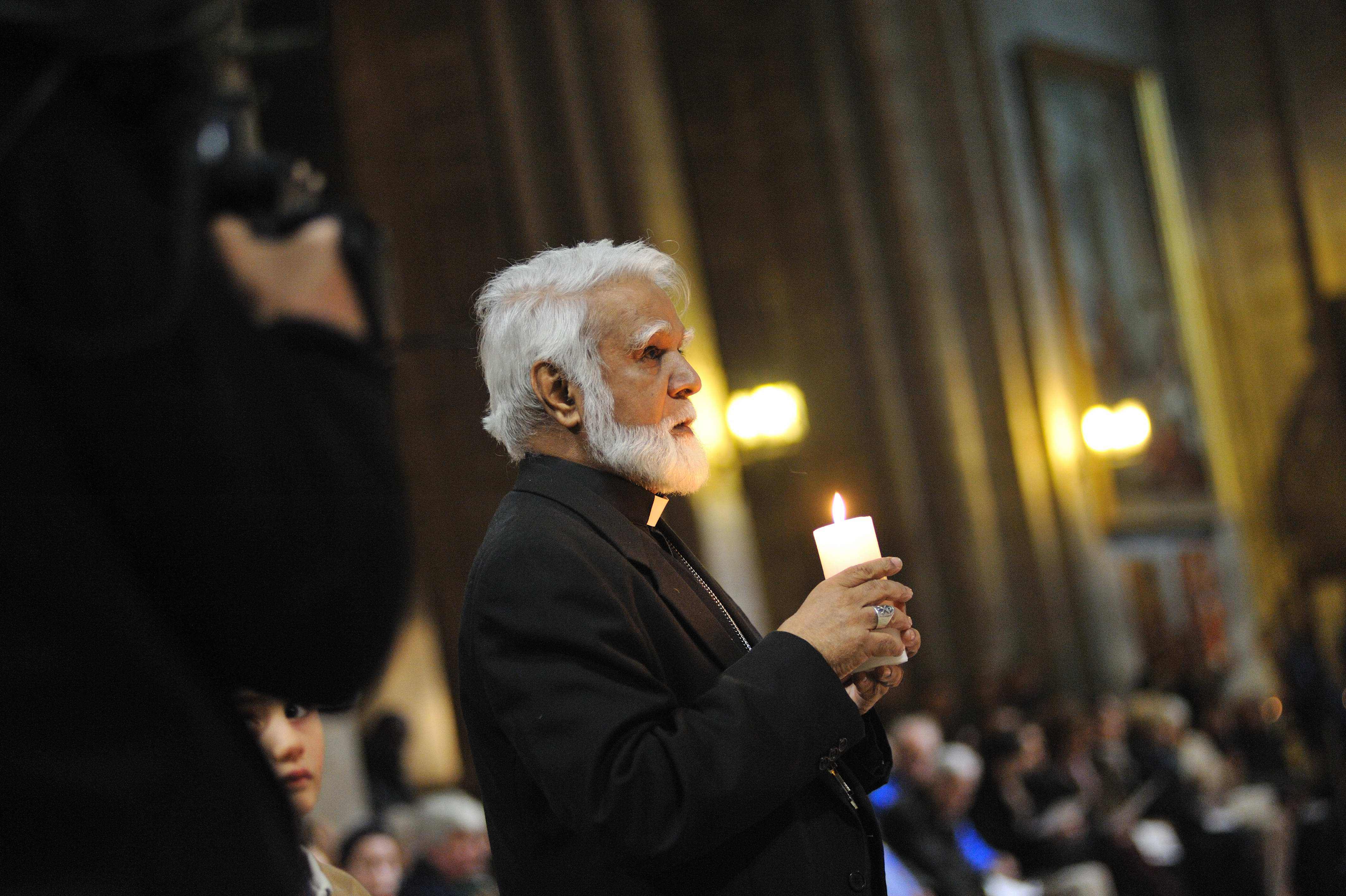 Mgr Coutts témoigne à Notre-Dame de Paris